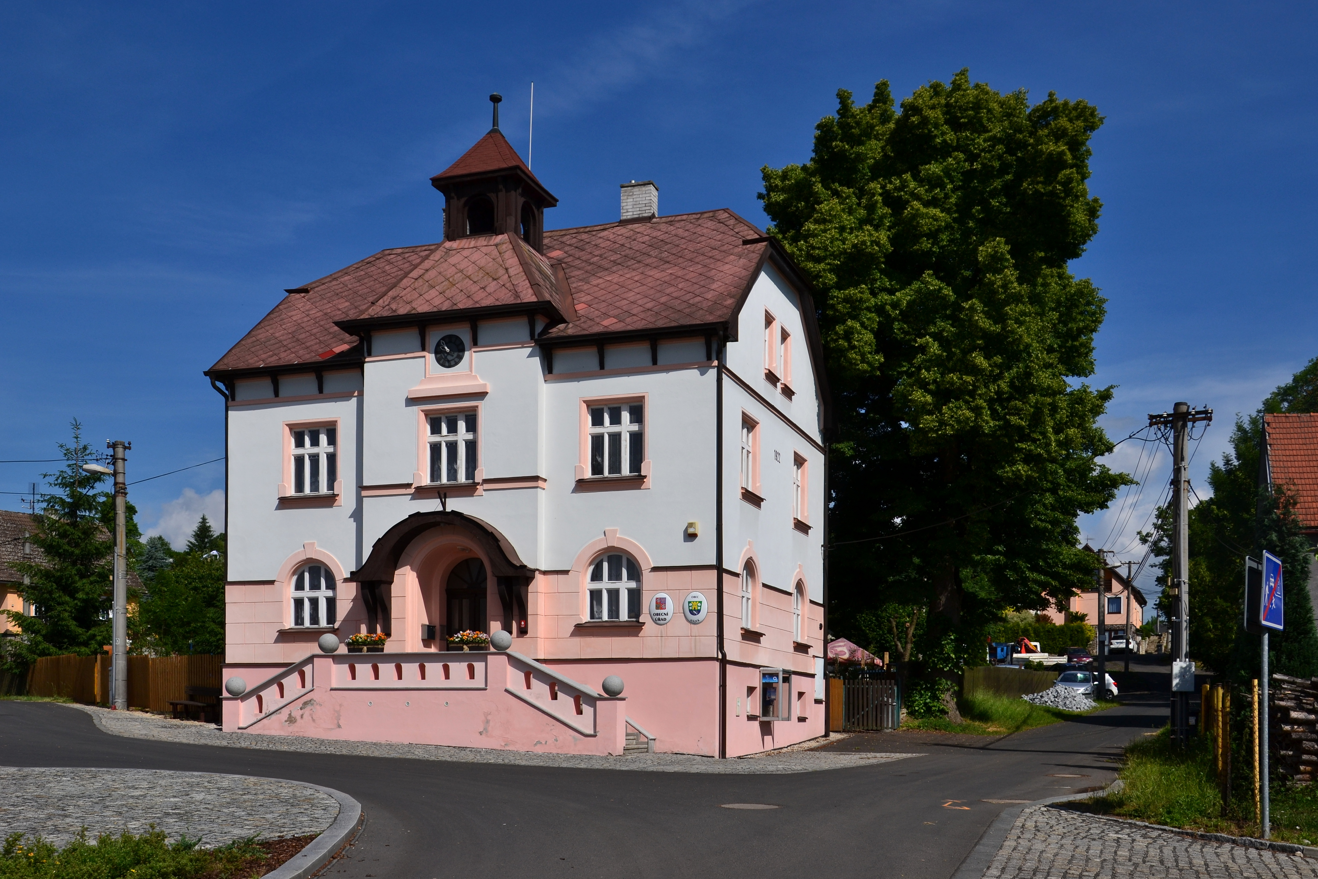 Hájek - obecní úřad